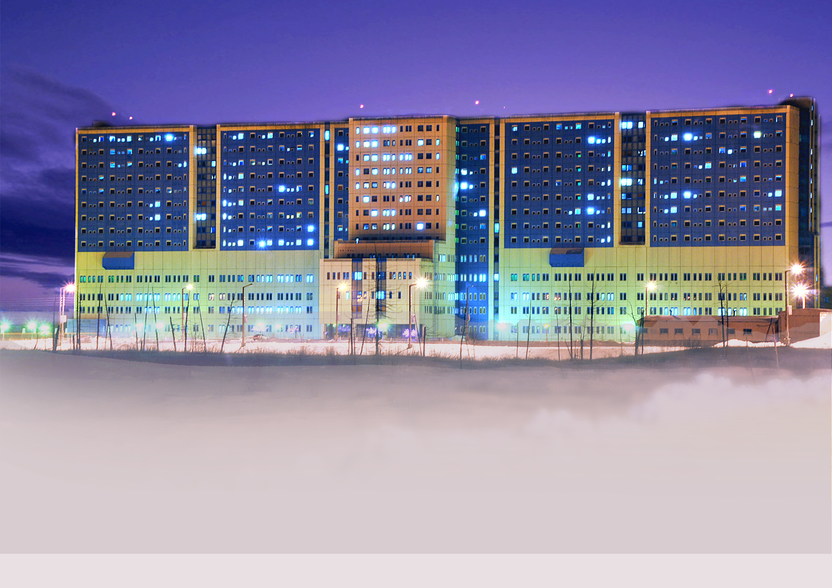 Новое здание Городской больницы №1 г. Норильска